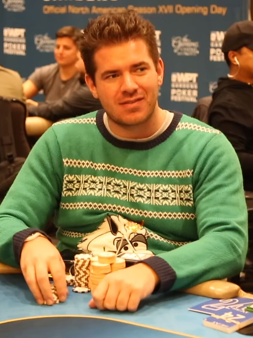 Marvin Rettenmaier bei der World Poker Tour Gardens